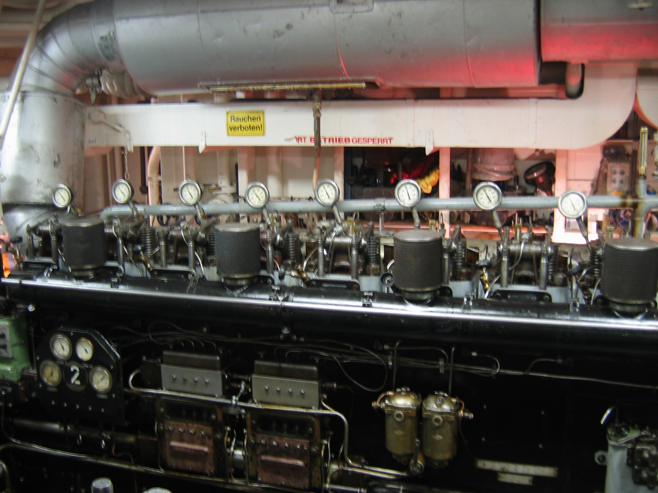 Diesel generator on MS Cap San Diego (Hamburg)